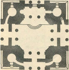 План первого яруса храма-памятника павшим при взятии Казани в 1552 году